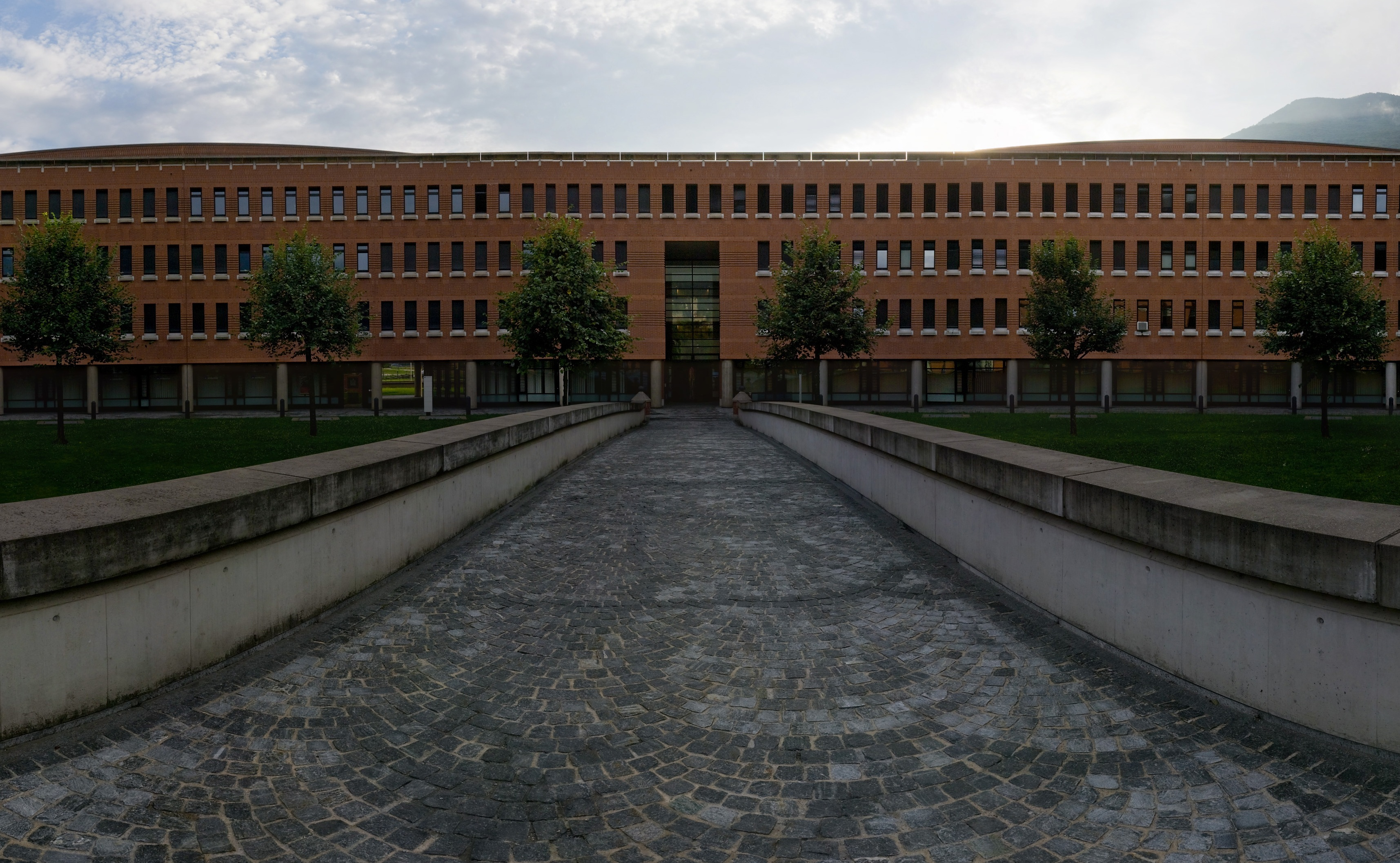 Bürogebäude von Mario Botta in Bellinzona Geplant als «Direktion des Fermeldewesens», später genutzt als Swisscom-Verwaltungsgebäude, jetzt ein Businesscenter.